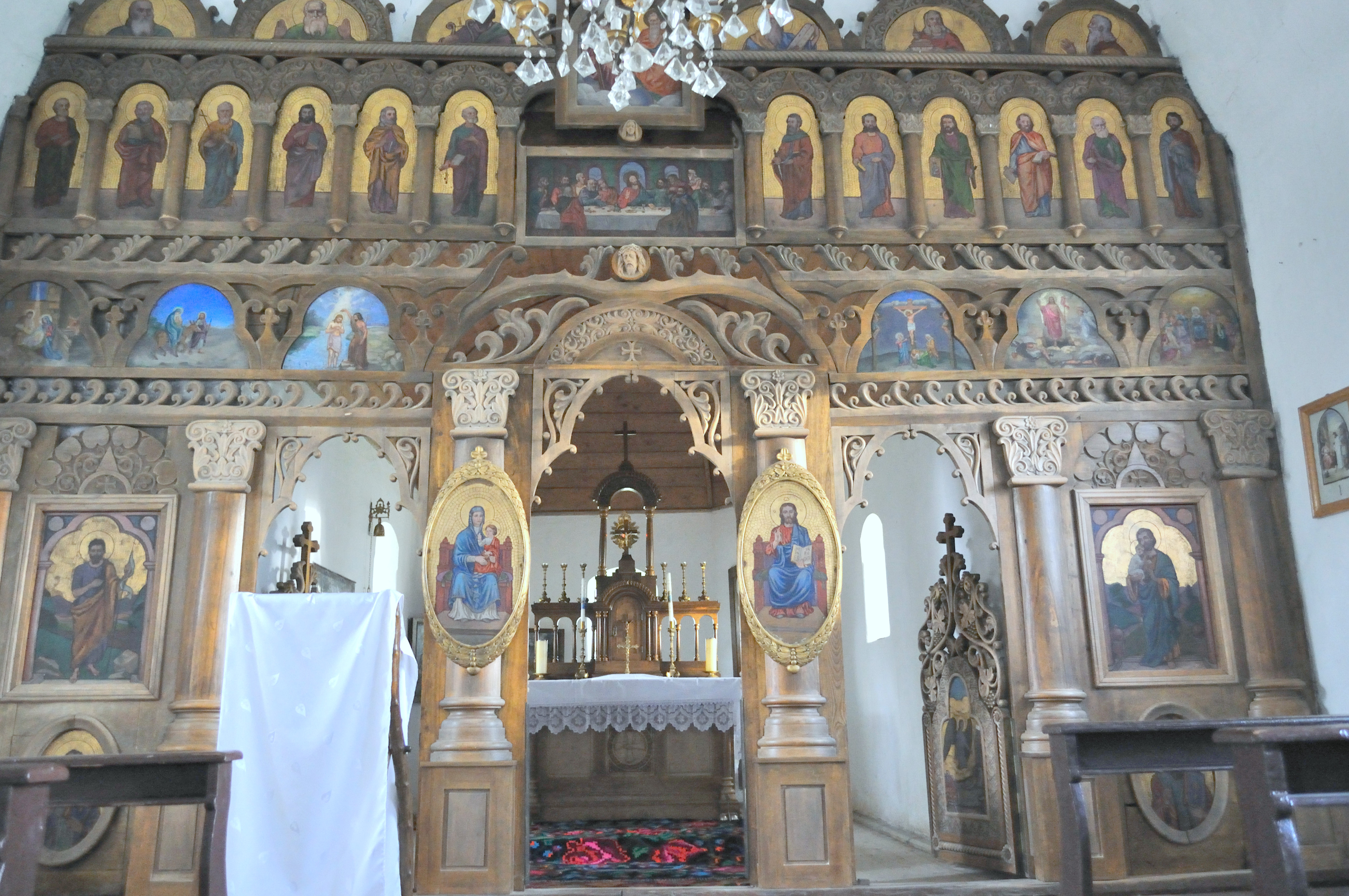 Biserica monument „Sfinții Arhangheli” din Sarasău, județul Maramureș